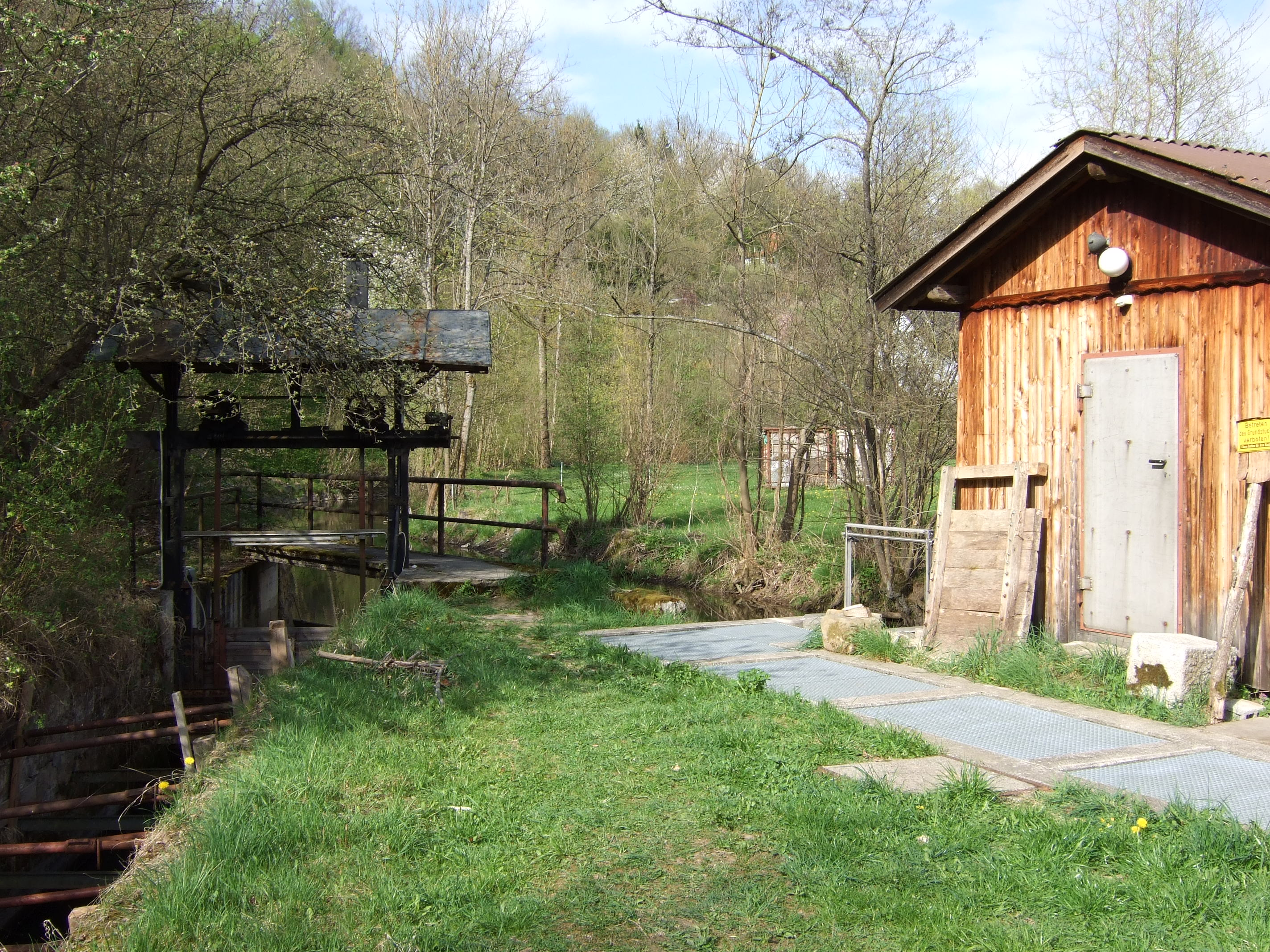 Wehr des Döhlauer Grabens